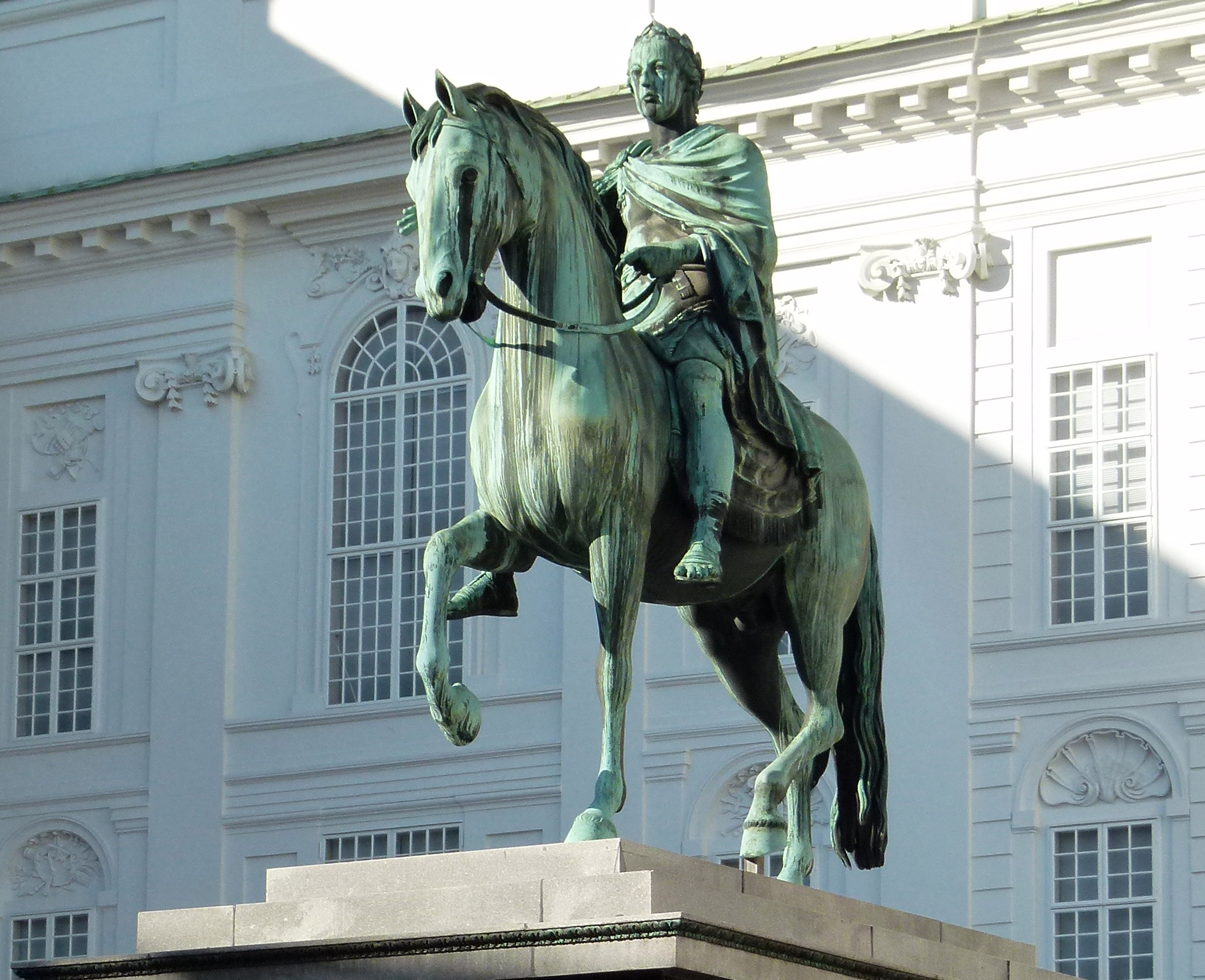 Joseph II. - Denkmal